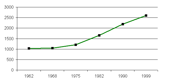 Population de Groisy (1962-1999).